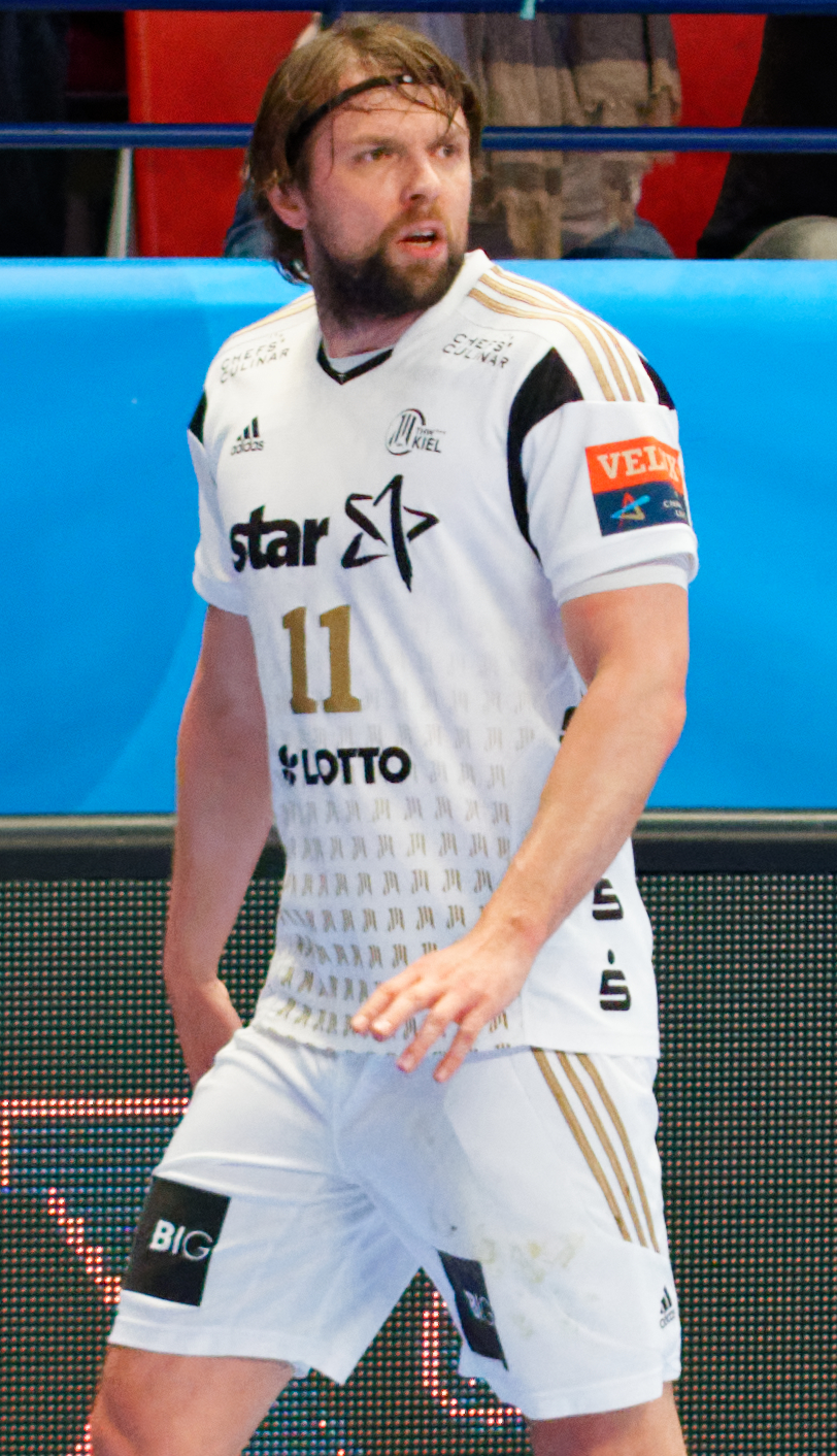 Rencontre de phase de groupe de la ligue des champions 2016-17 entre le PSG et le THW Kiel. A Coubertin, le 12 mars 2017.